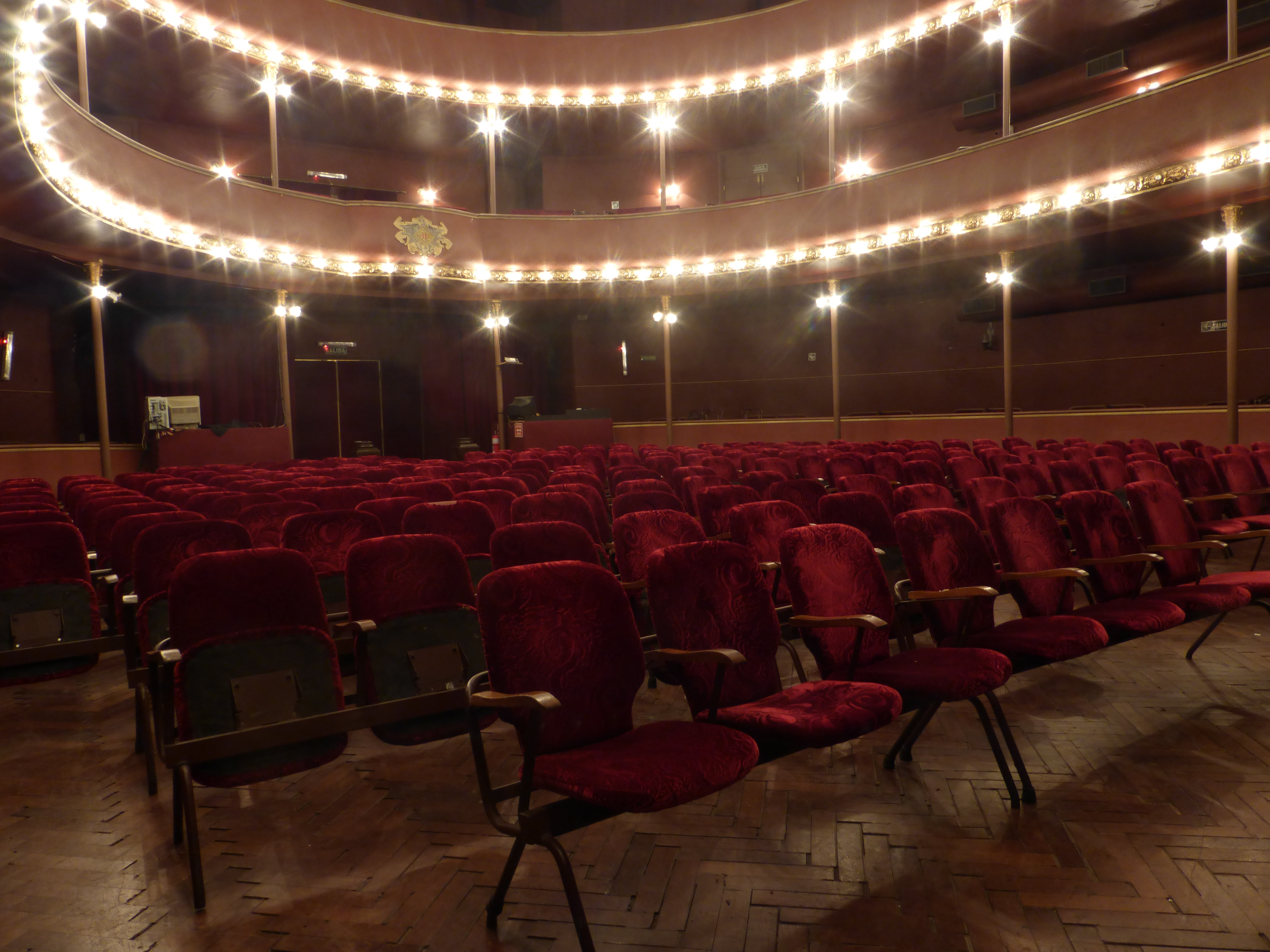 Vista del Teatro Margarita Xirgu, en el interior del Casal de Catalunya, ubicado en el barrio porteño de San Telmo.